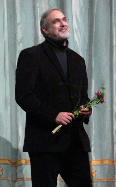 Kobie van Rensburg, nach der Premiere von Händels "Il trionfo del tempo e del disinganno" im Stadttheater Passau (Regie: Kobie van Rensburg)